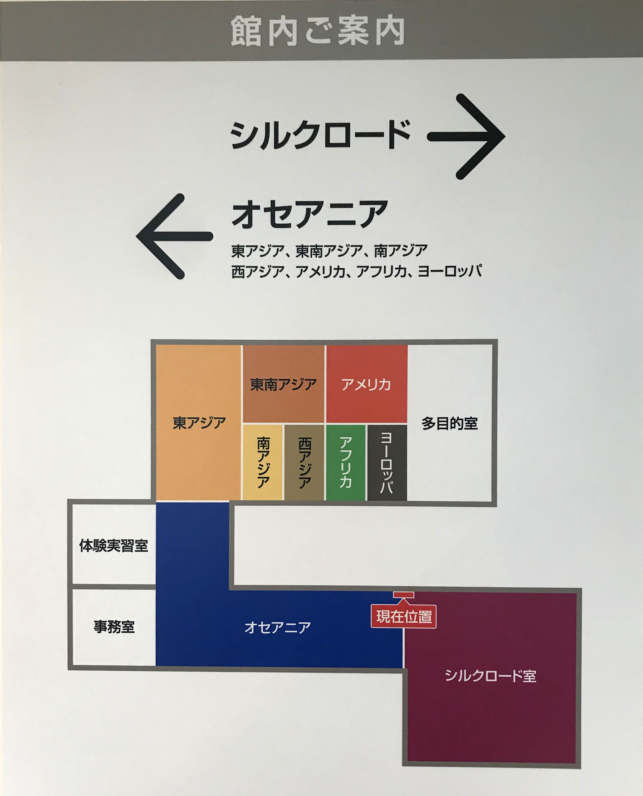 撮影場所：中部大学民俗資料博物館 撮影日：２０１９年７月２日 中部大学民俗資料博物館の案内図